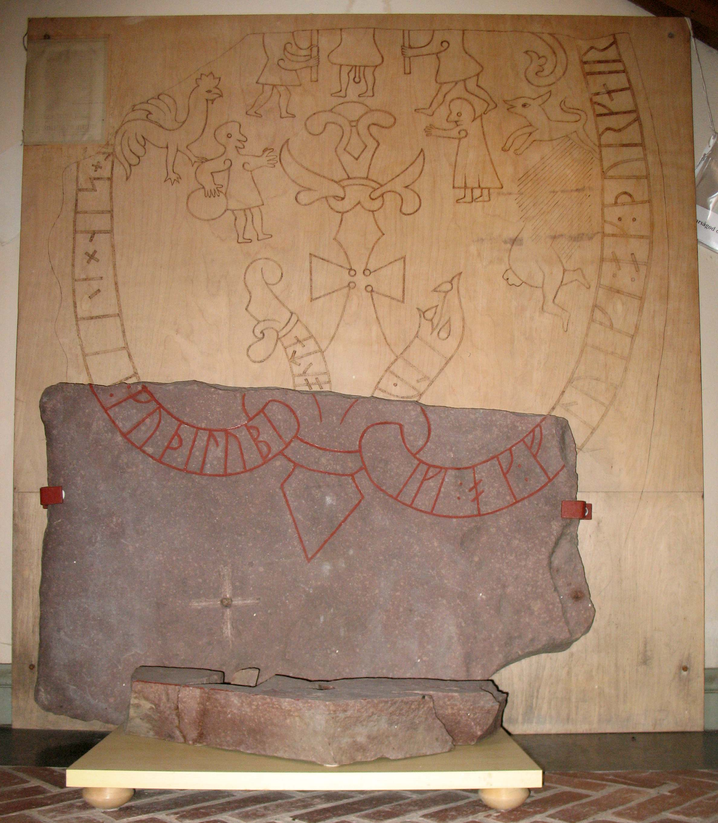 Runstenen Gs 2 i Österfärnebo.